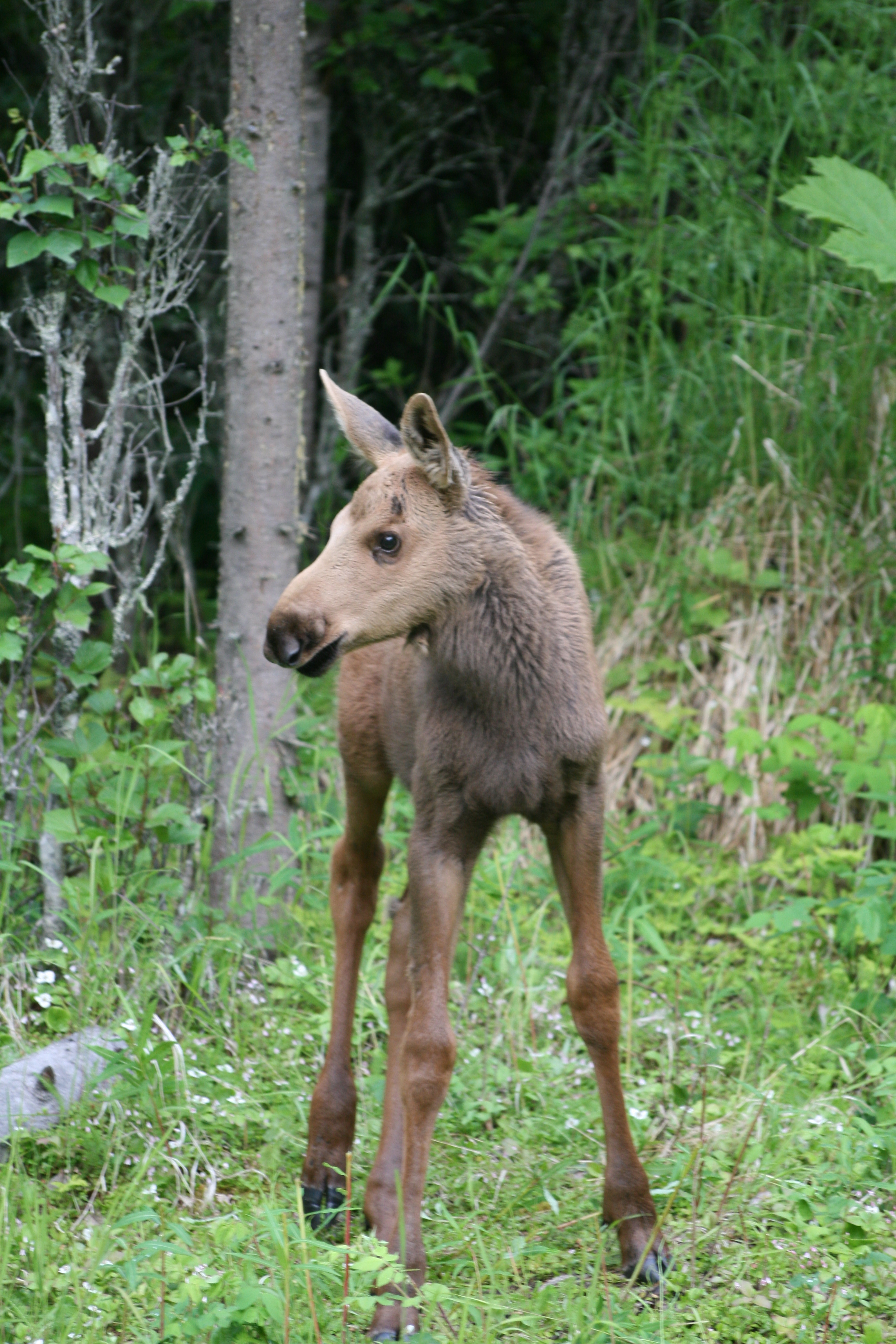 Photo: Matthew Strausser, USFWS 2011 Wilderness Fellow